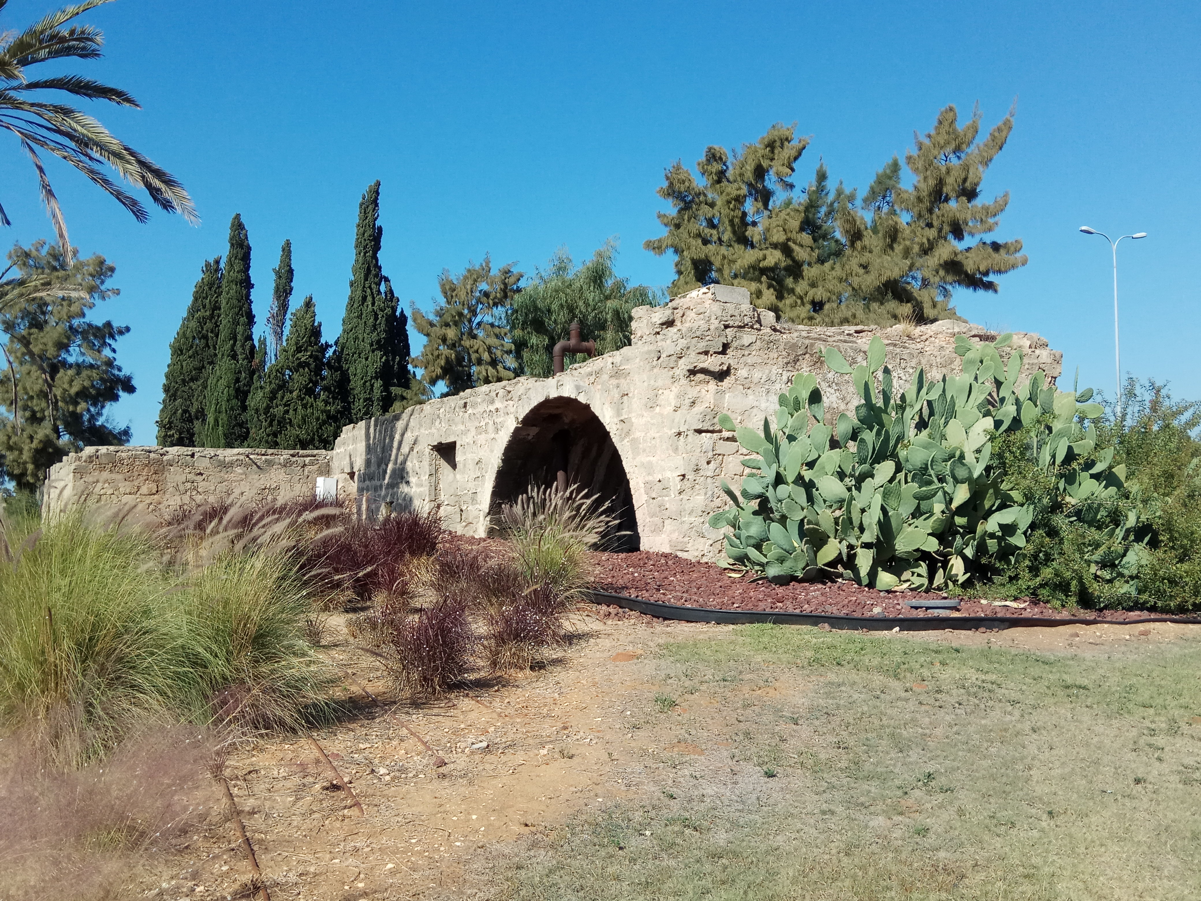 שרידי בית הבאר באתר בית הקק"ל בצומת בית דגן